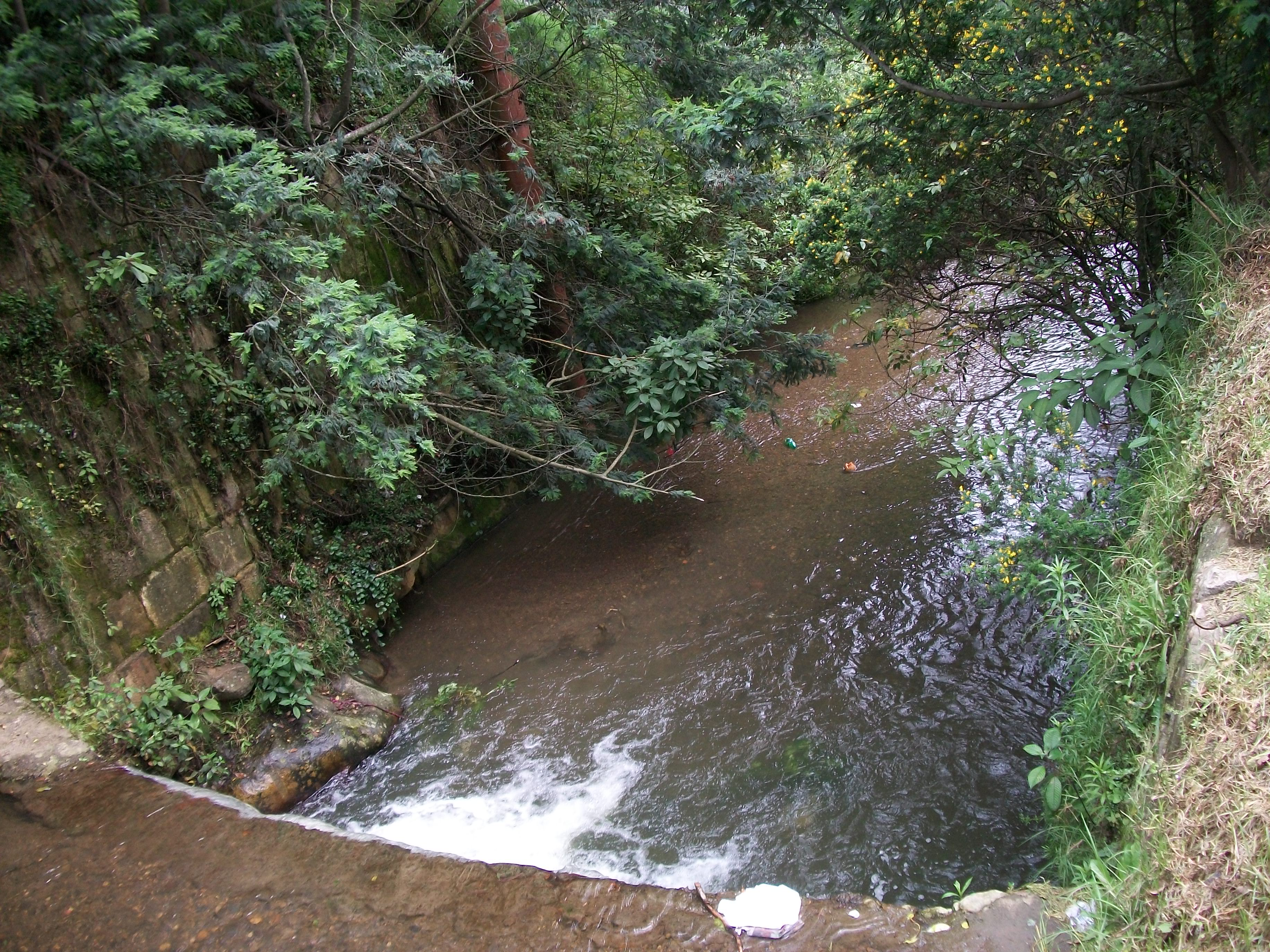 Río San Francisco metros antes de su canalización.